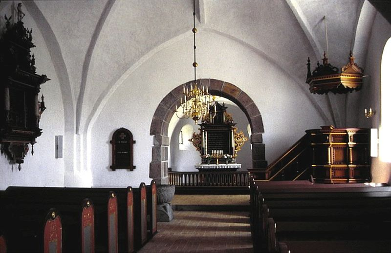 Gjern Kirke kirkeskibet Gjern Kirke